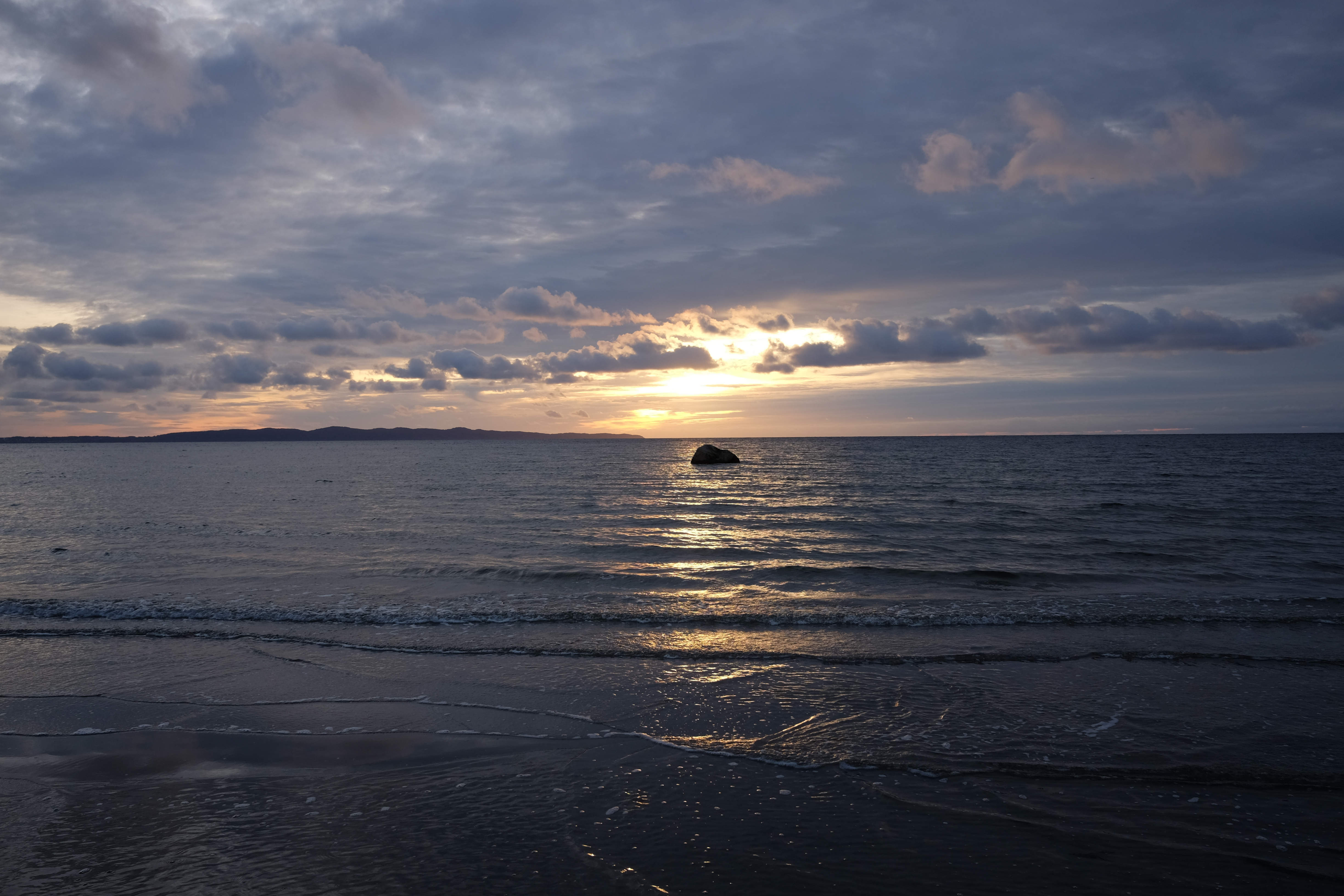 Skälderviken, nära skymning. I bakgrunen Kullaberg.